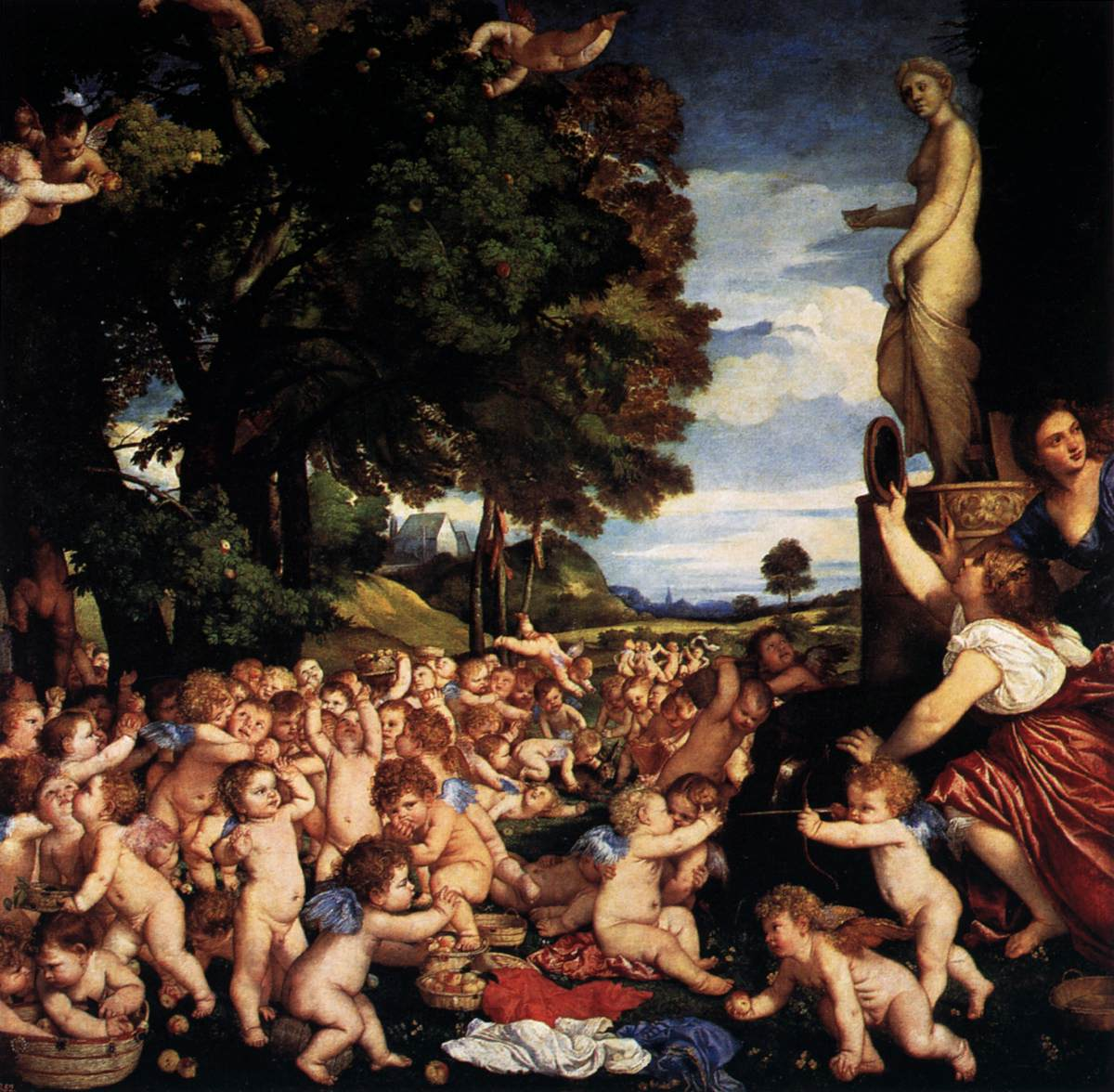 La obra, titulada Ofrenda a Venus, es uno de los lienzos de Tiziano que se conservan en el Museo del Prado.